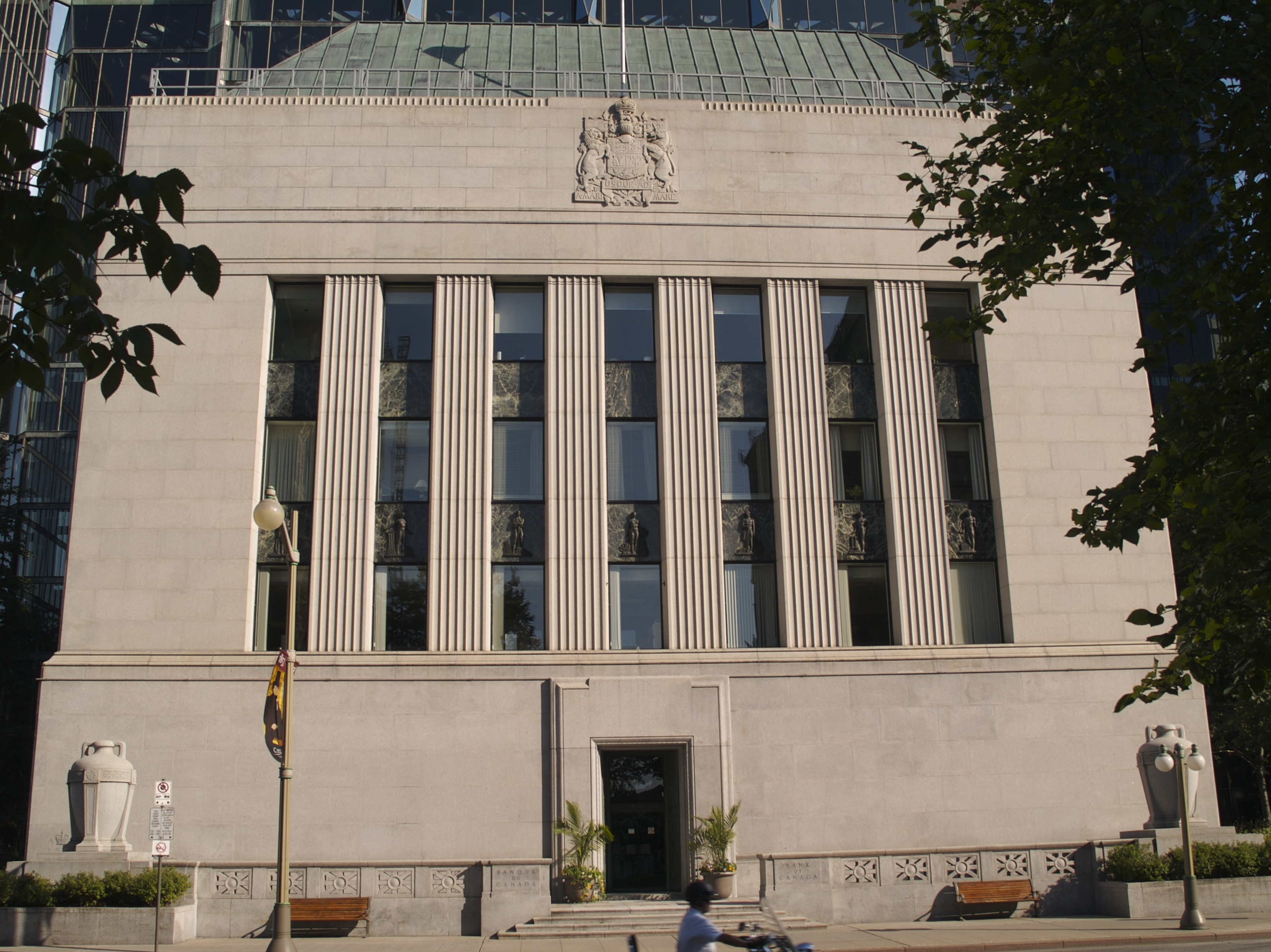 Bank of Canada